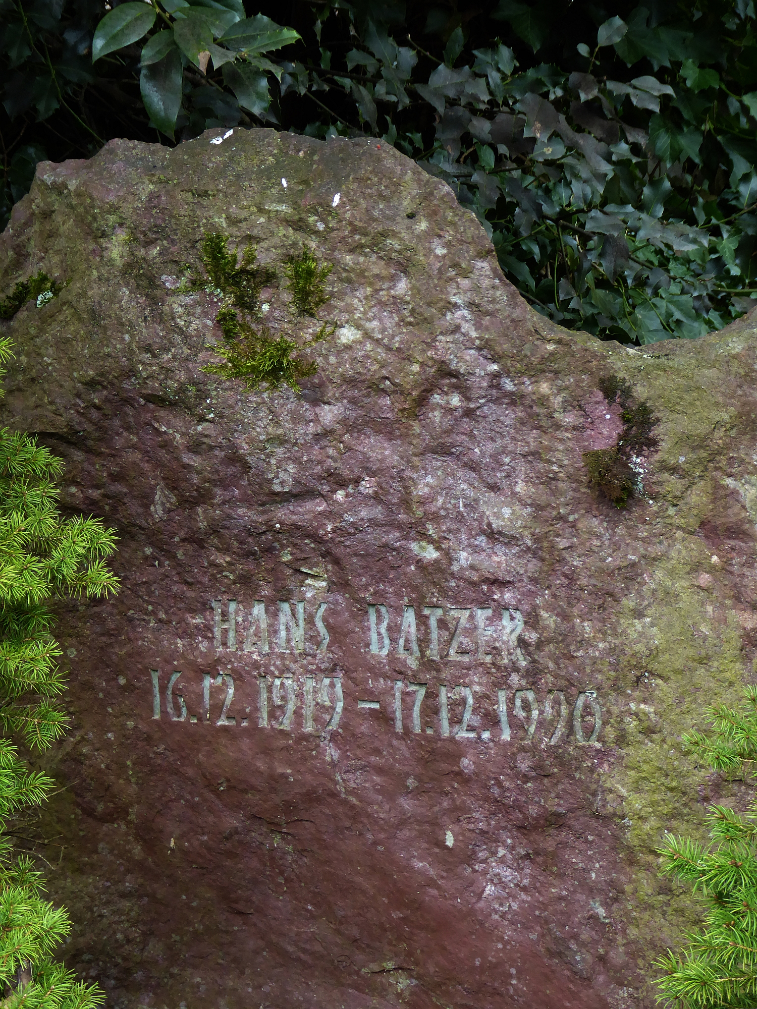 Hans Batzer (1919–1990) Chemiker, Forschungsdirektor an der Ciba AG, Honorarprofessor an der TH Stuttgart und an der Universität Konstanz Grab auf dem Friedhof Bromhübel in Arlesheim, Basel-Land